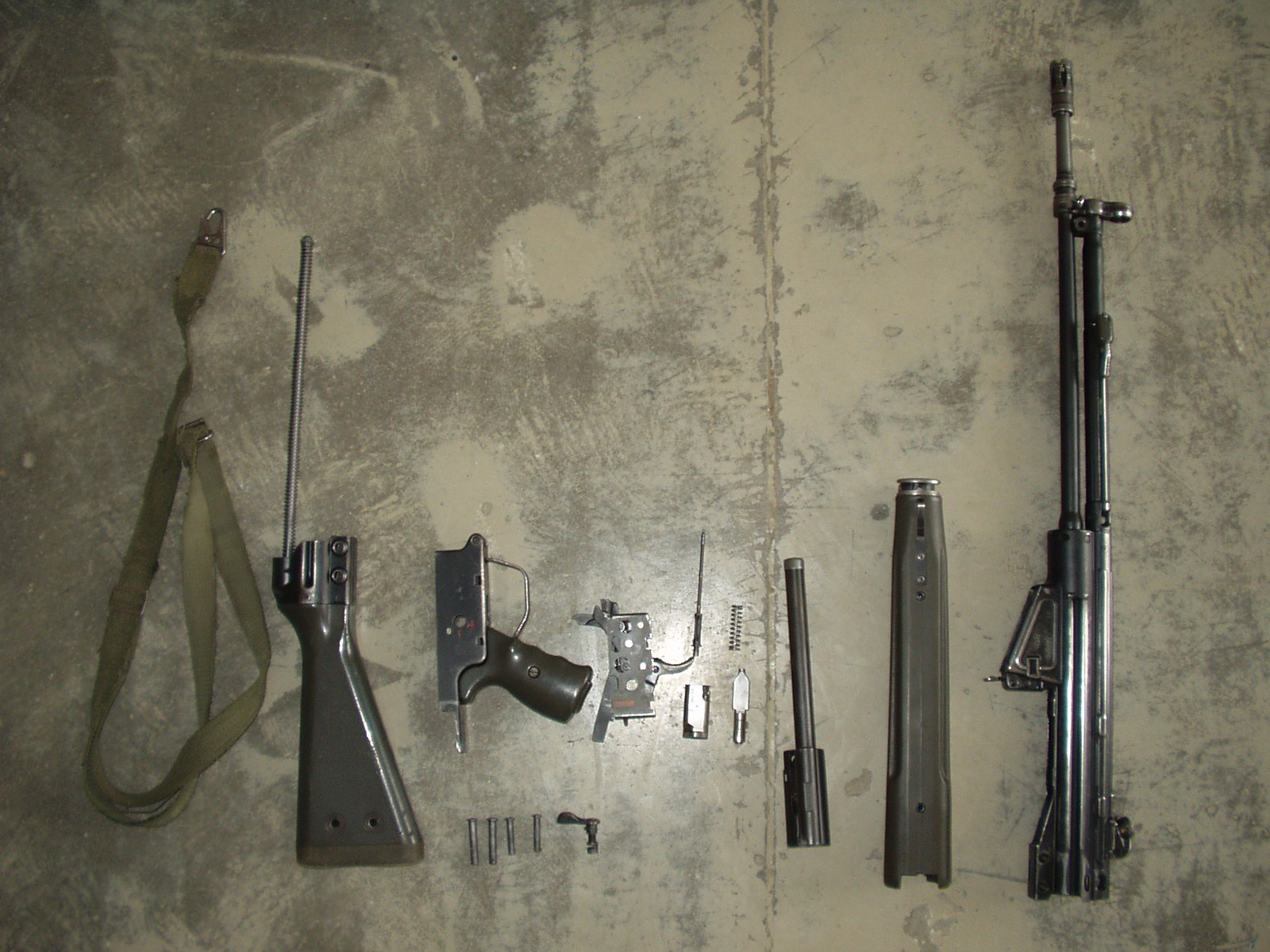 Disassembled Heckler&Koch G3A3 battle rifle.